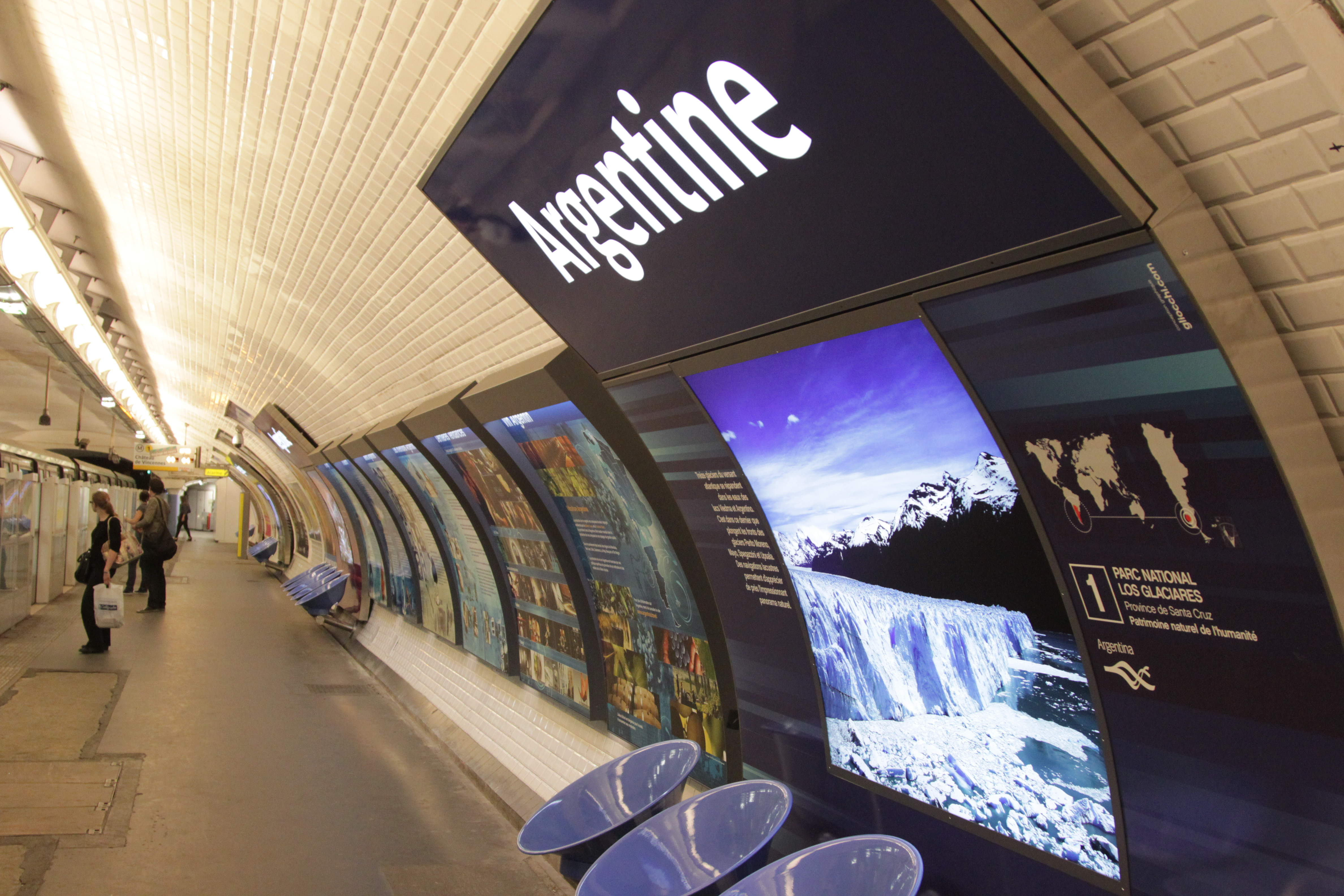 Station Argentine sur la ligne 1 du métro de Paris.